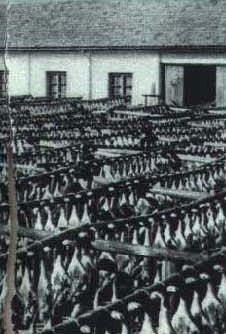 1964-07 1964年 金华火腿